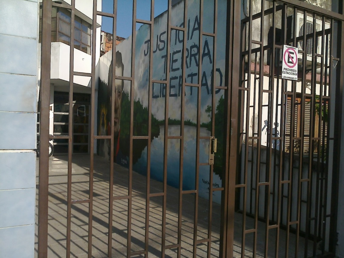 Imagenes del frente del gremio SITRAJ